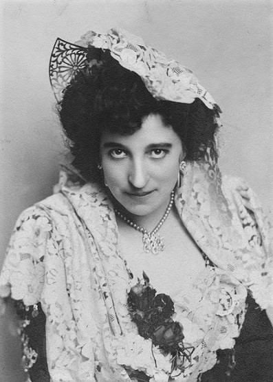 Eugenia Mantelli